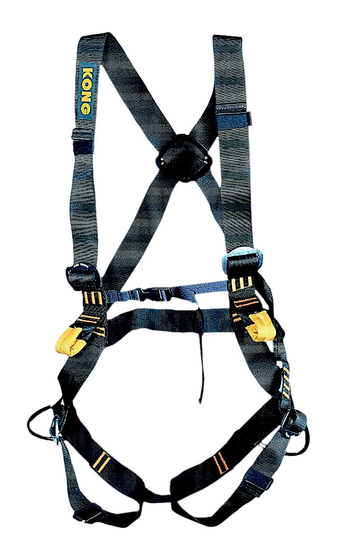 Questa foto è stata concessa in uso da Kong per Wikipedia. l'autore non conoscendo i termini della licenza CC a affidato al sottoscritto di fare "come meglio credi"